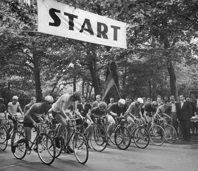 Leipzig, Straßenrennen der Junioren, Start Zentralbild Wendorf-Schaar 2.8.1960 Koch - Treffpunkt "Kleine Weltmeisterschaft". Die jeweils zwei besten jugendlichen Strassenfahrer aus jedem Bezirk starteten am 2.8.1960 zu einem Rundstreckenrennen "Treffpunkt kleine Weltmeisterschaft" auf dem Leipziger Scheibenhols. UBz: Start der 14 - 16jährigen.